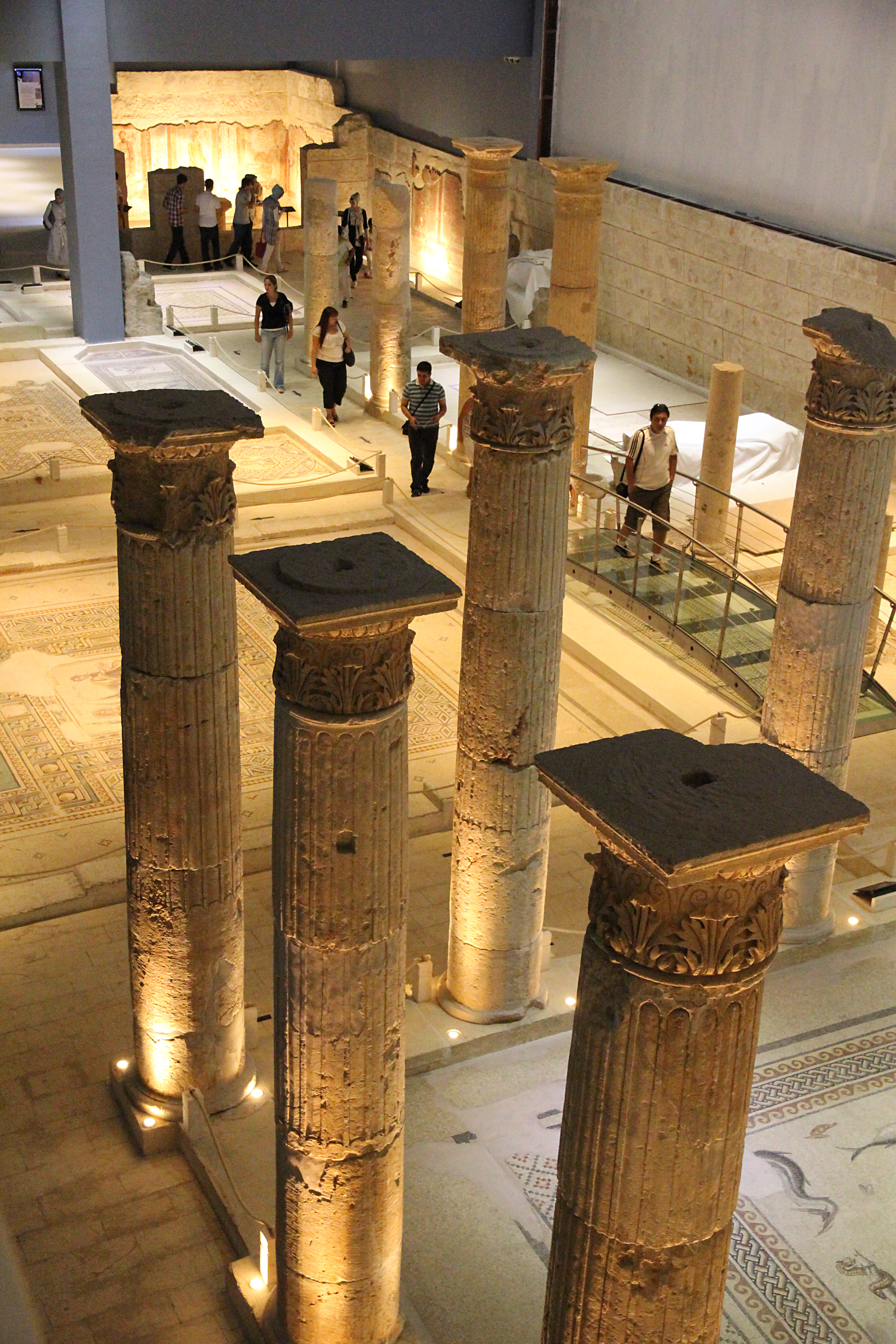 Zeugma-Mosaik-Museum, Gaziantep, Türkei